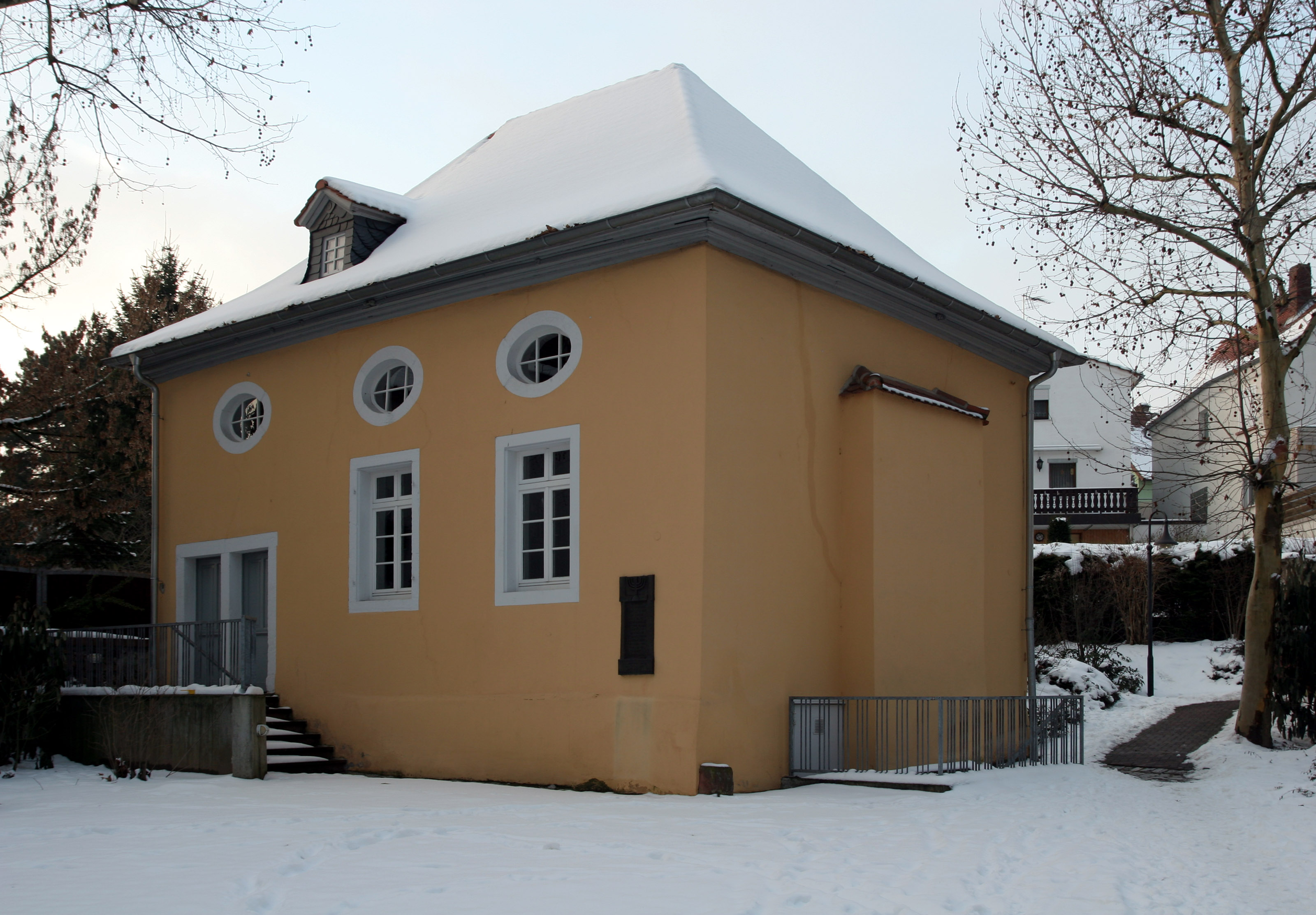 Die ehemalige Synagoge von Bensheim-Auerbach (Hessen)